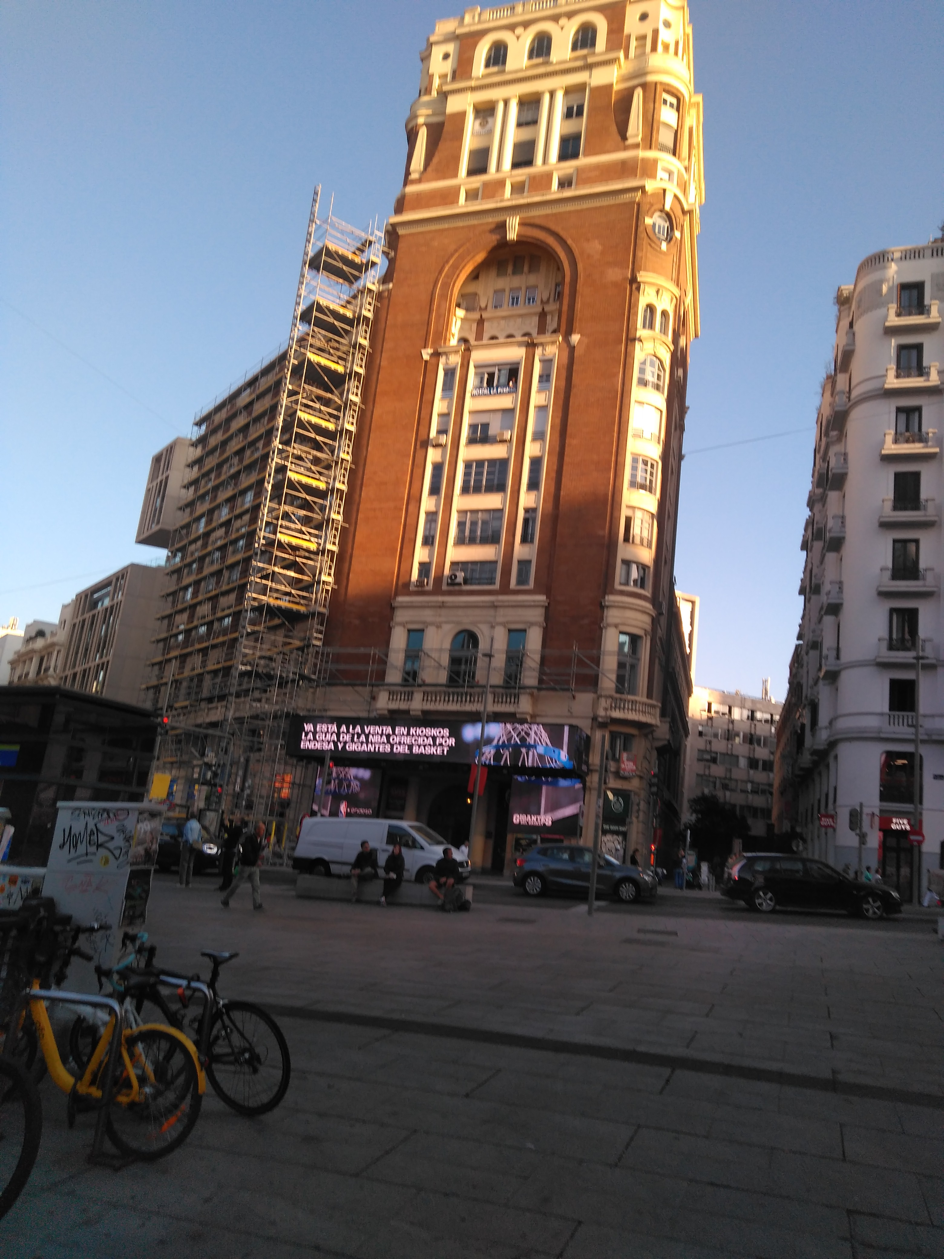 Edificio sede Carto, plaza del Callao (Madrid)